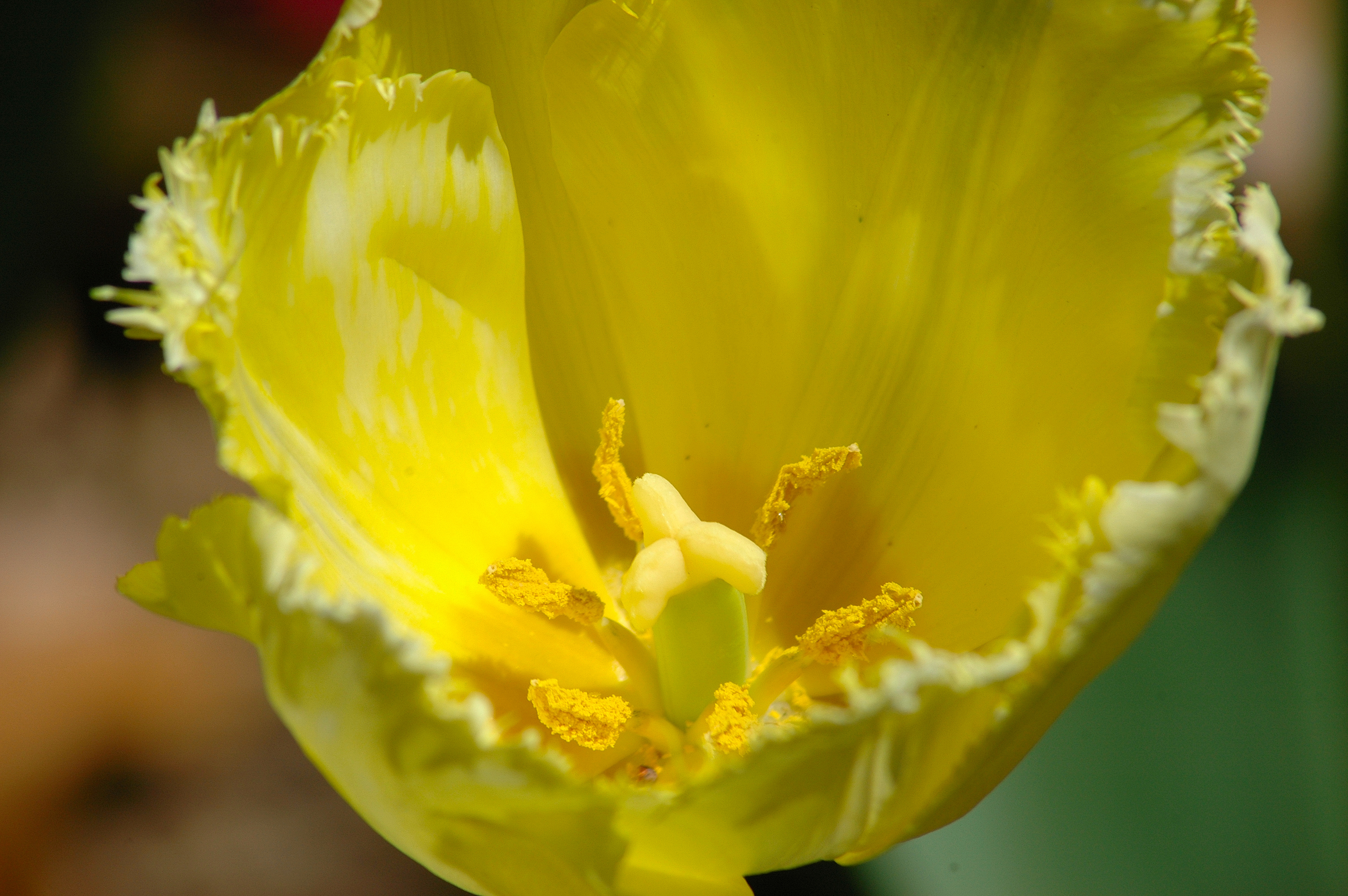 Tulipa 'Hamilton'.